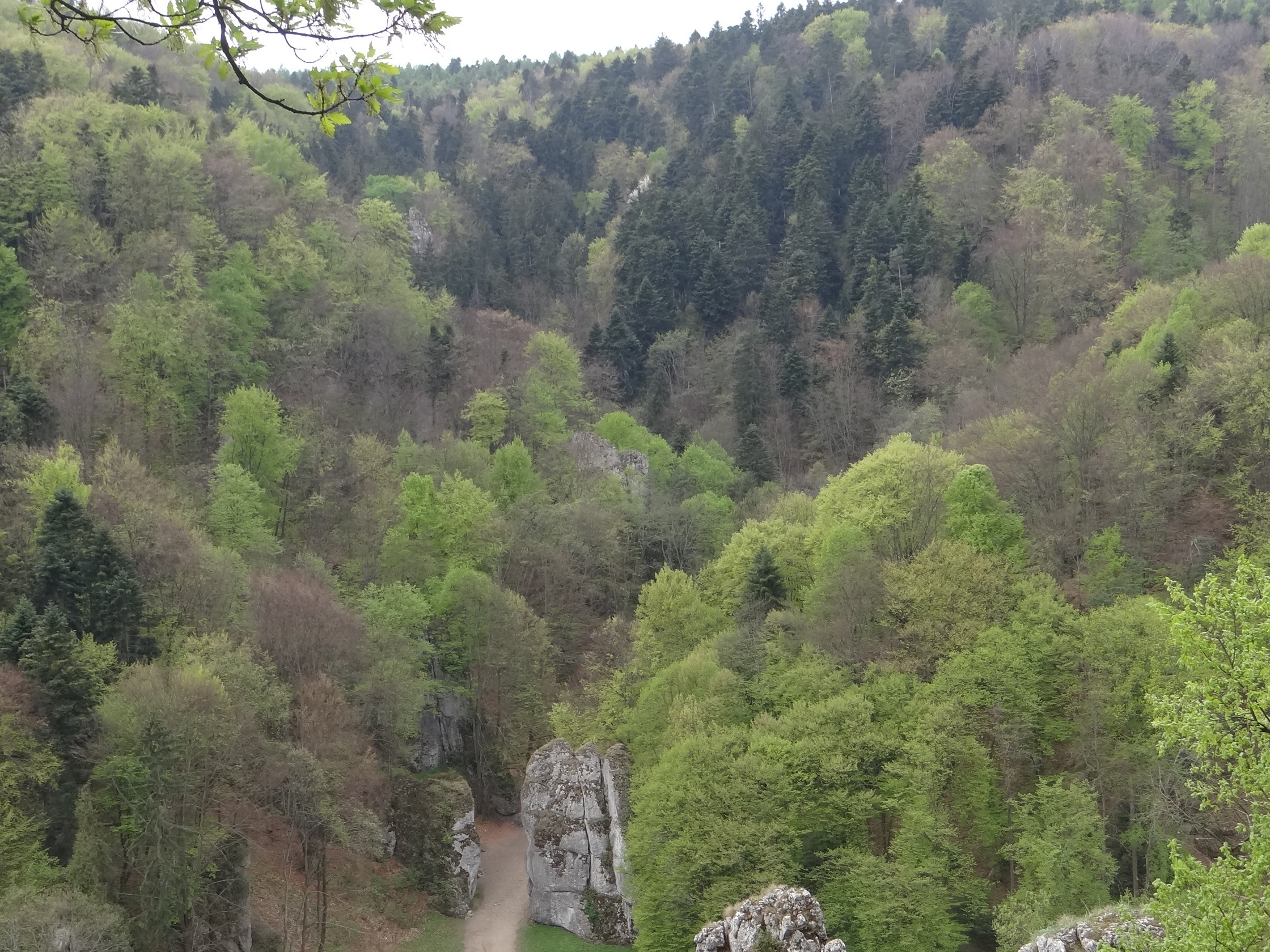 Wąwóz za Krakowską Bramą. Widok z przedsionka Jaskini Ciemnej